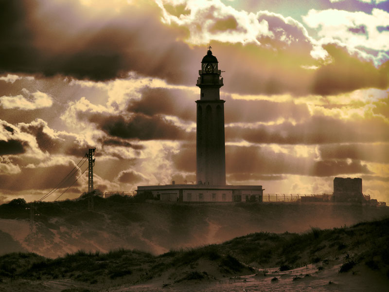 Faro de Trafalgar